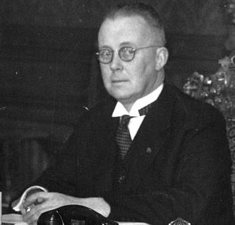 Carel Goseling (1891-1941), Nederlands politicus